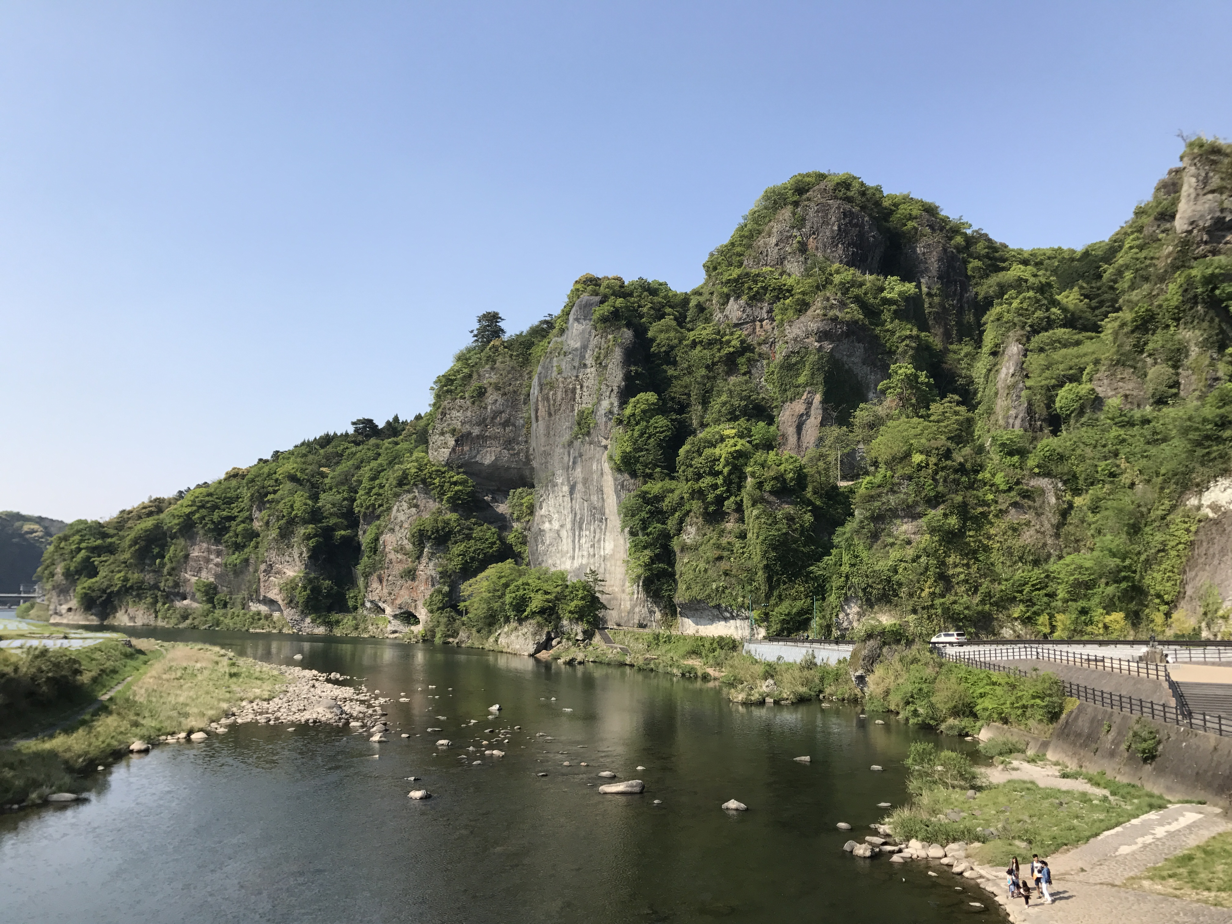 本耶馬渓・禅海橋より望む山国川(下流側)と競秀峰